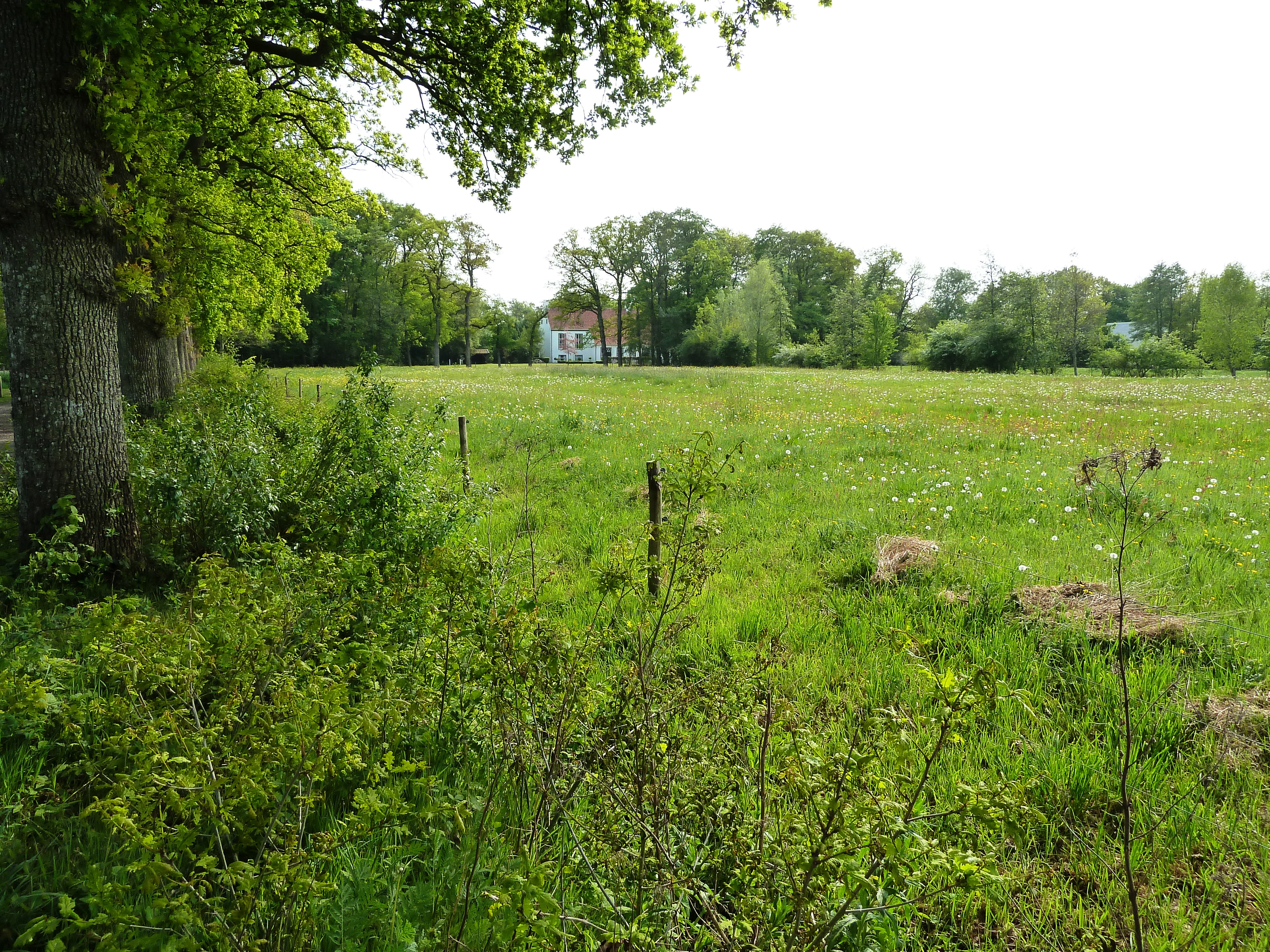 Coulisselandschap in het zuidelijk Westerkwartier (Groningen, Nederland) achter Niebert met op de achtergrond het Iwema-steenhuis.